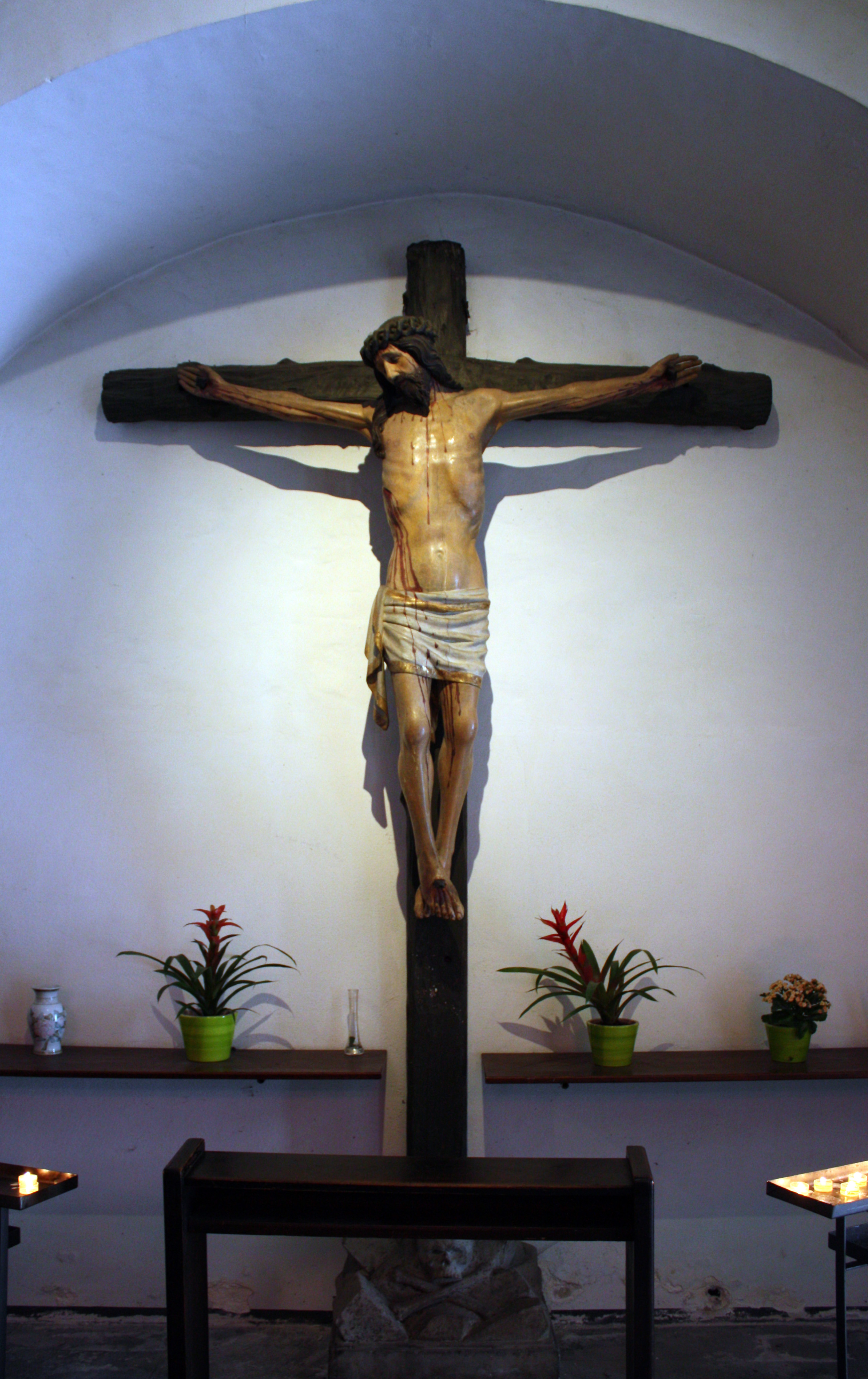 St. Georg Köln, nördliche Vorhalle. Kruzifix um 1440, Lindenholz; Höhe 175 cm, Breite 152 cm. Fachleute nehmen an, dass das Kreuz aus der benachbarten Pfarrkirche St. Jakob stammt und im Zuge des Abrisses dieser Kirche (1825) nach St. Georg gelangte